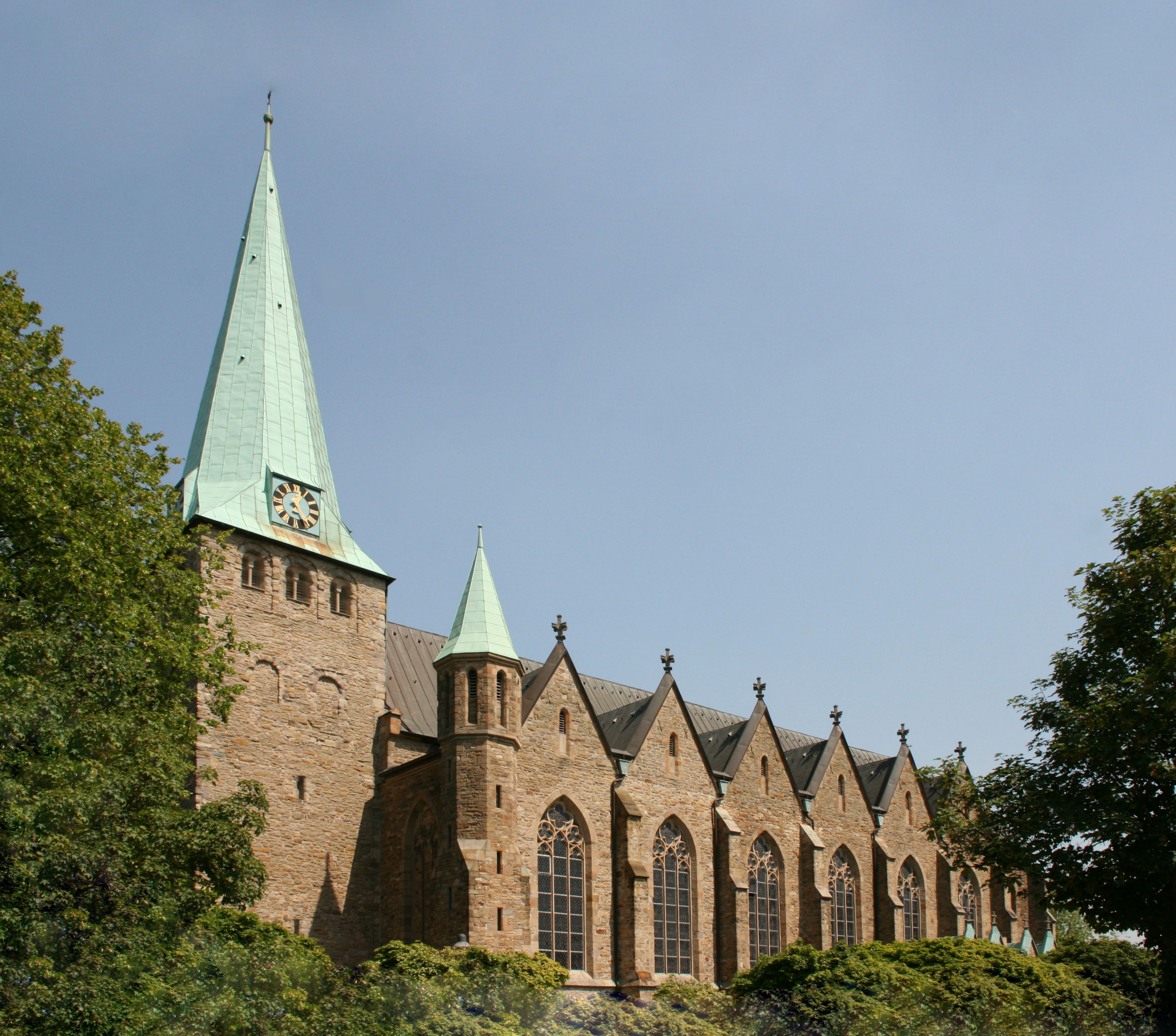 St. Mauritius, Essener Straße in Hattingen-Niederwenigern